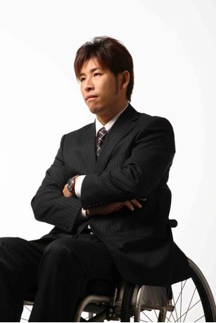 Basa Jawa: takuma aoki